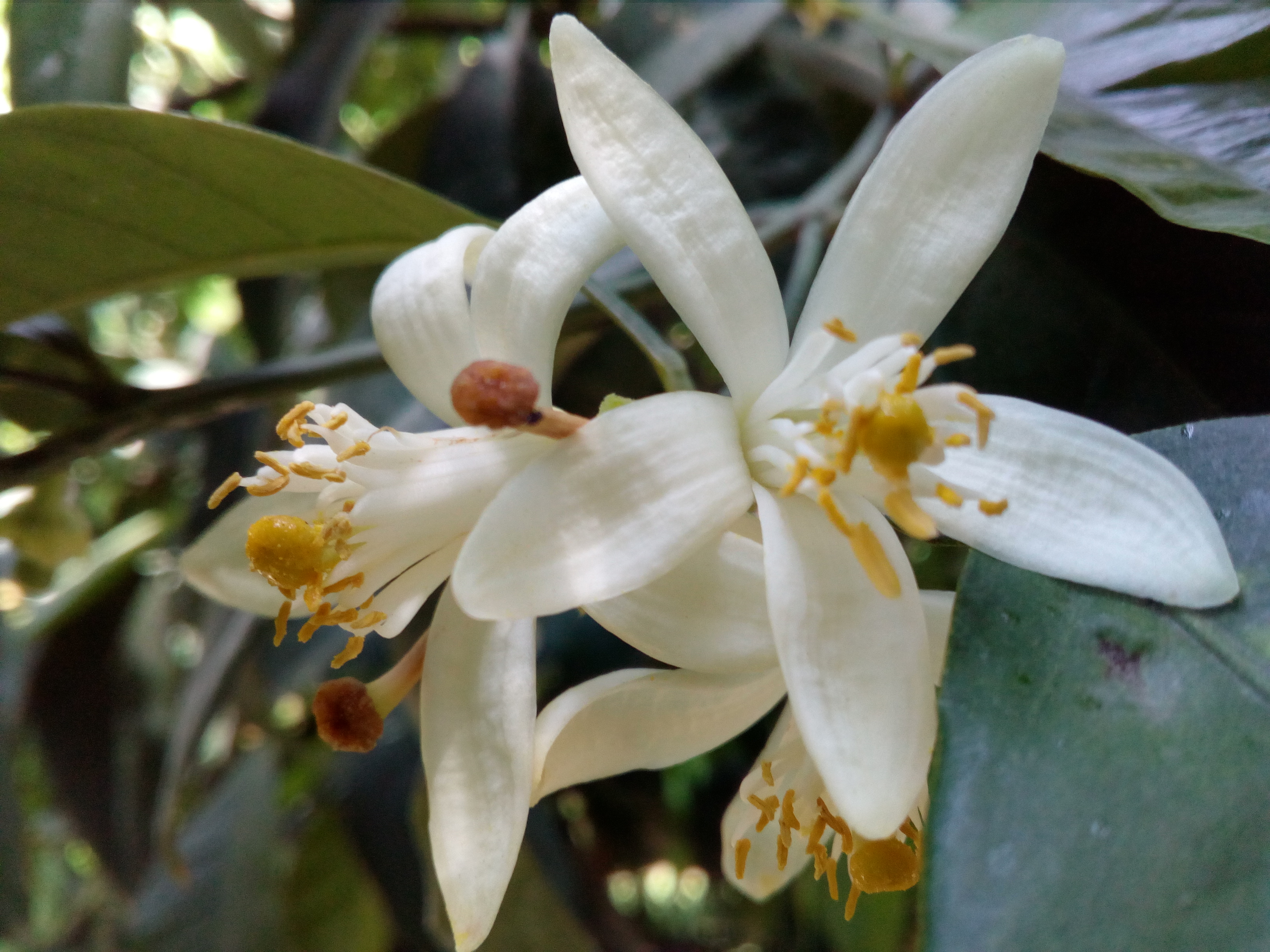 Άνθη νεραντζιάς